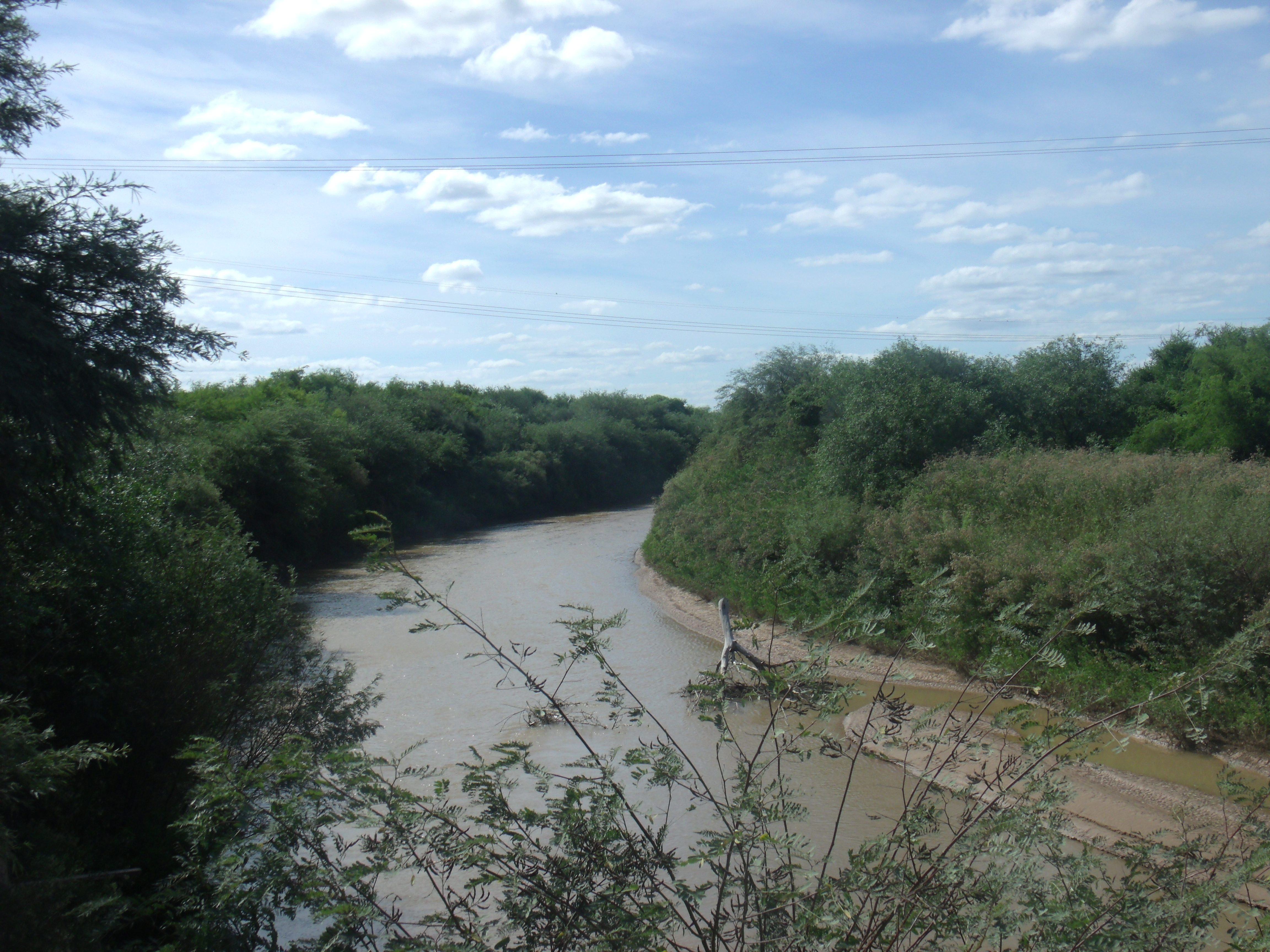 El río Salado desde el puente en Suncho Corral hacia el Norte